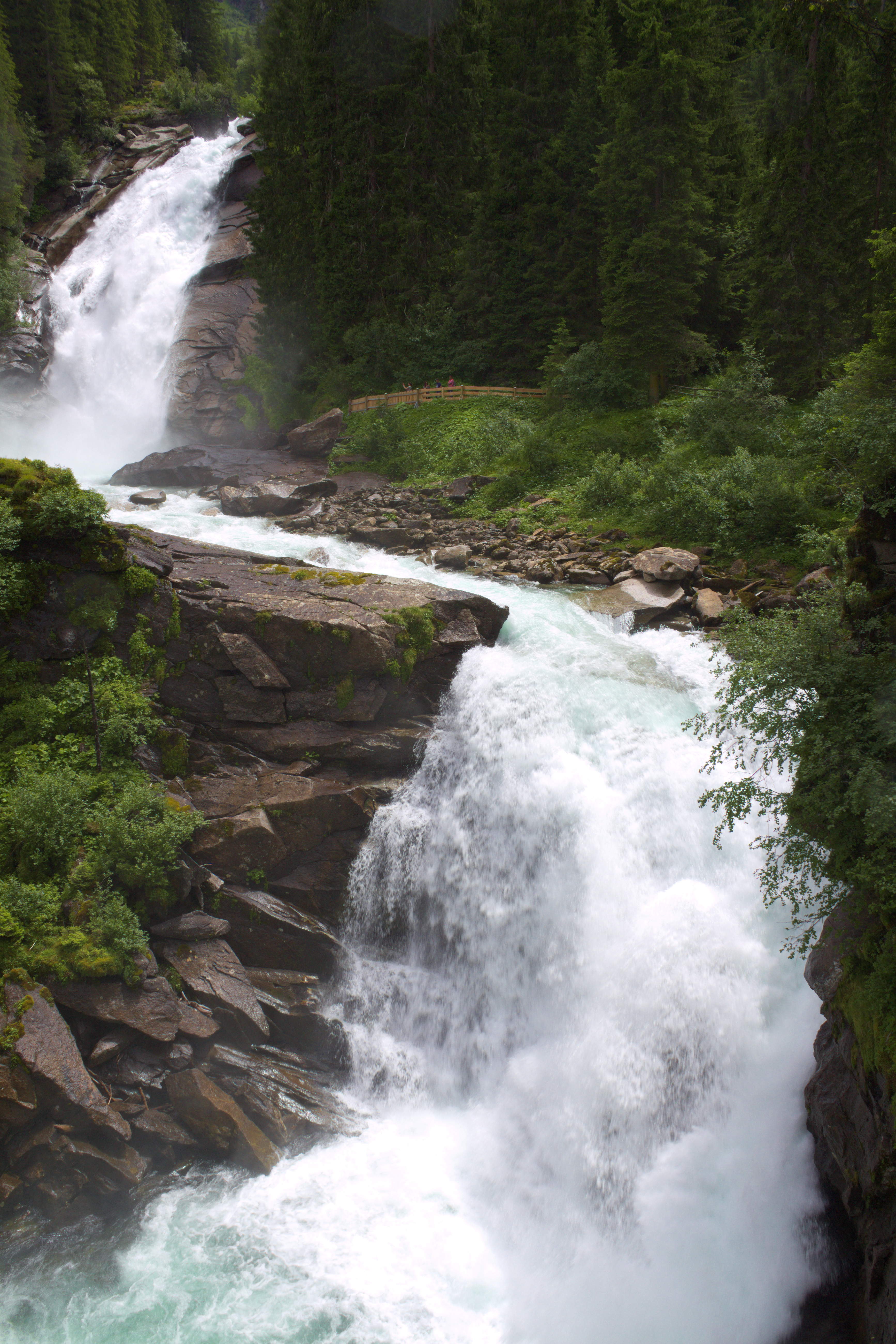 Krimmler Wasserfälle